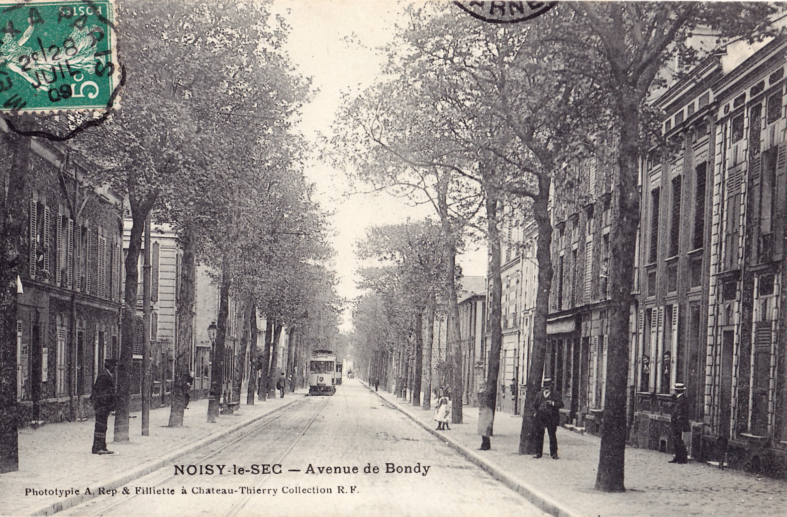 Carte postale ancienne éditée par Rep et Filliette à Château-Thierry, collection RF :NOISY-LE-SEC - Avenue de Bondy.Oblitération par cachet d'ambulant postal, ligne de Meaux à Paris